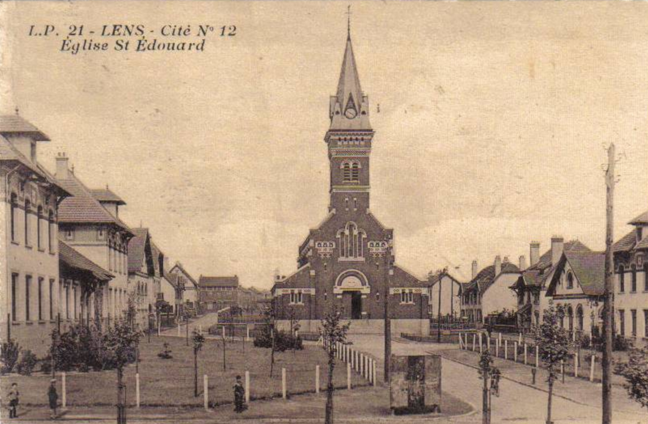 Église Saint-Édouard des cités de la Fosse n° 12 de la Compagnie des mines de Lens, Lens, Pas-de-Calais, Nord-Pas-de-Calais, France.